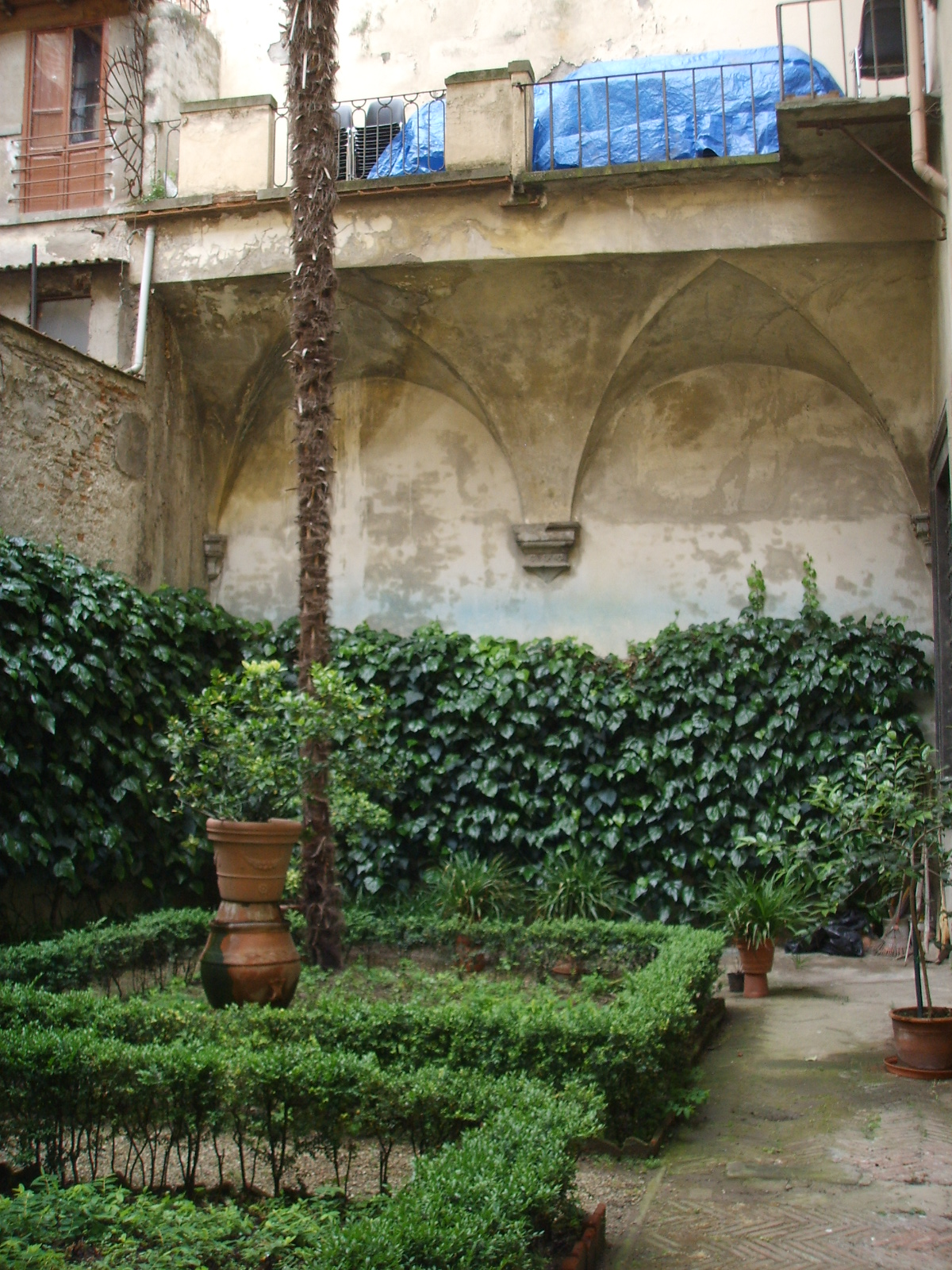 Palazzo di cosimo ridolfi, giardino